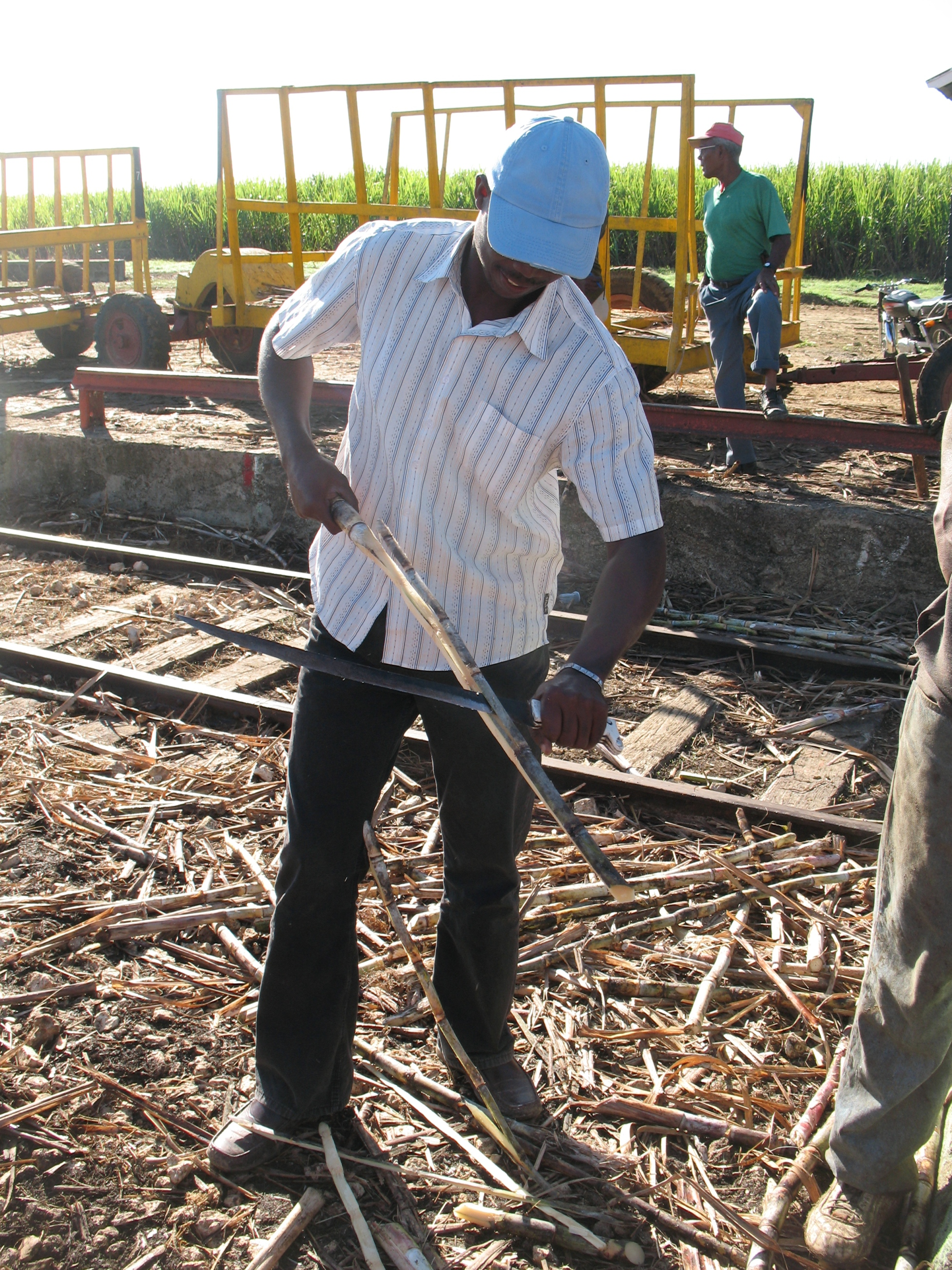 Braceros haitiani al lavoro in un campo di raccolta di canna da zucchero nella Repubblica Domenicana